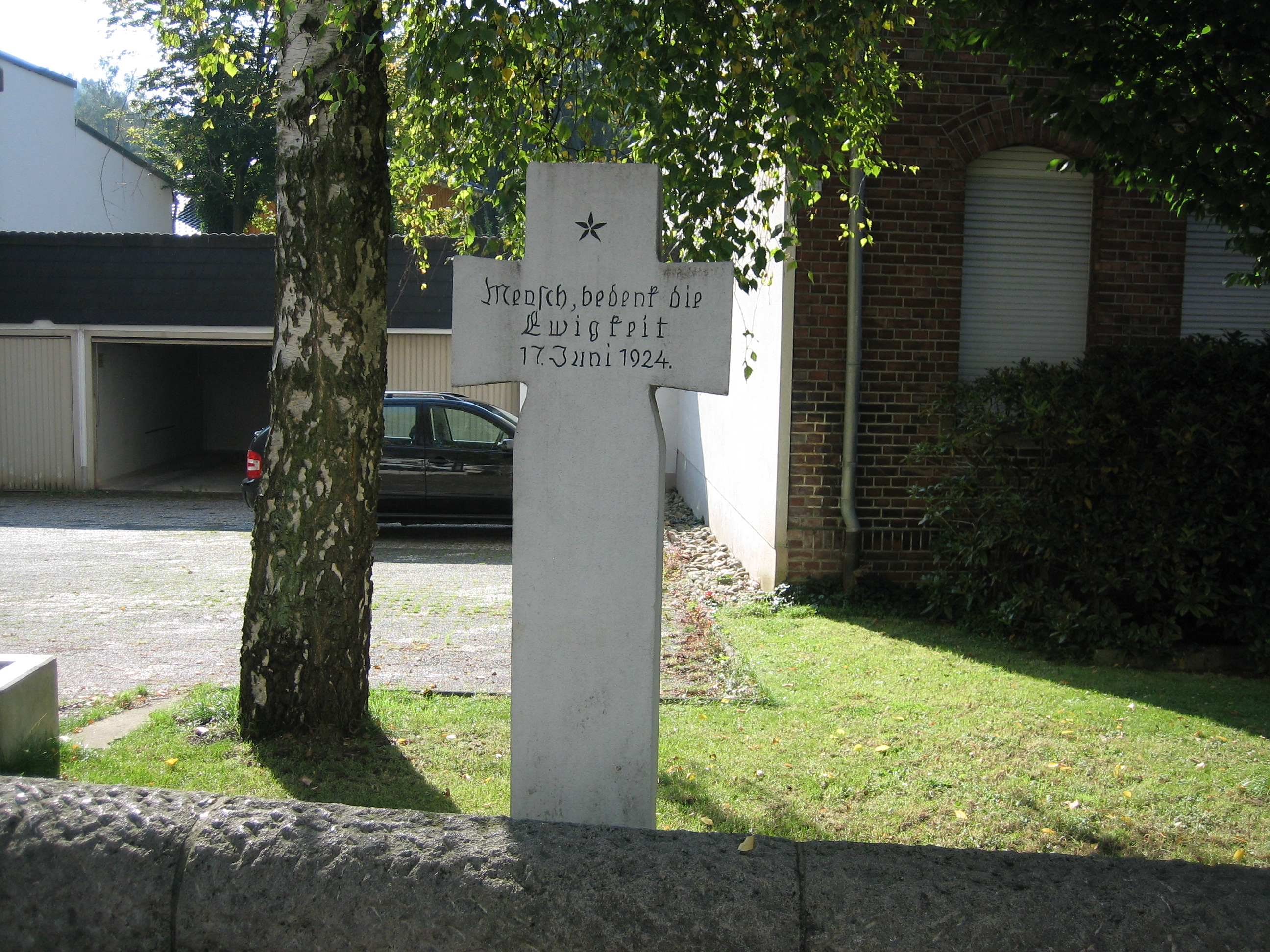 Aufgestelltes Steinkreuz zur Erinnerung an das Straßenbahnunglück an der Düsingstraße in Iserlohn am 17. Juni 1924.